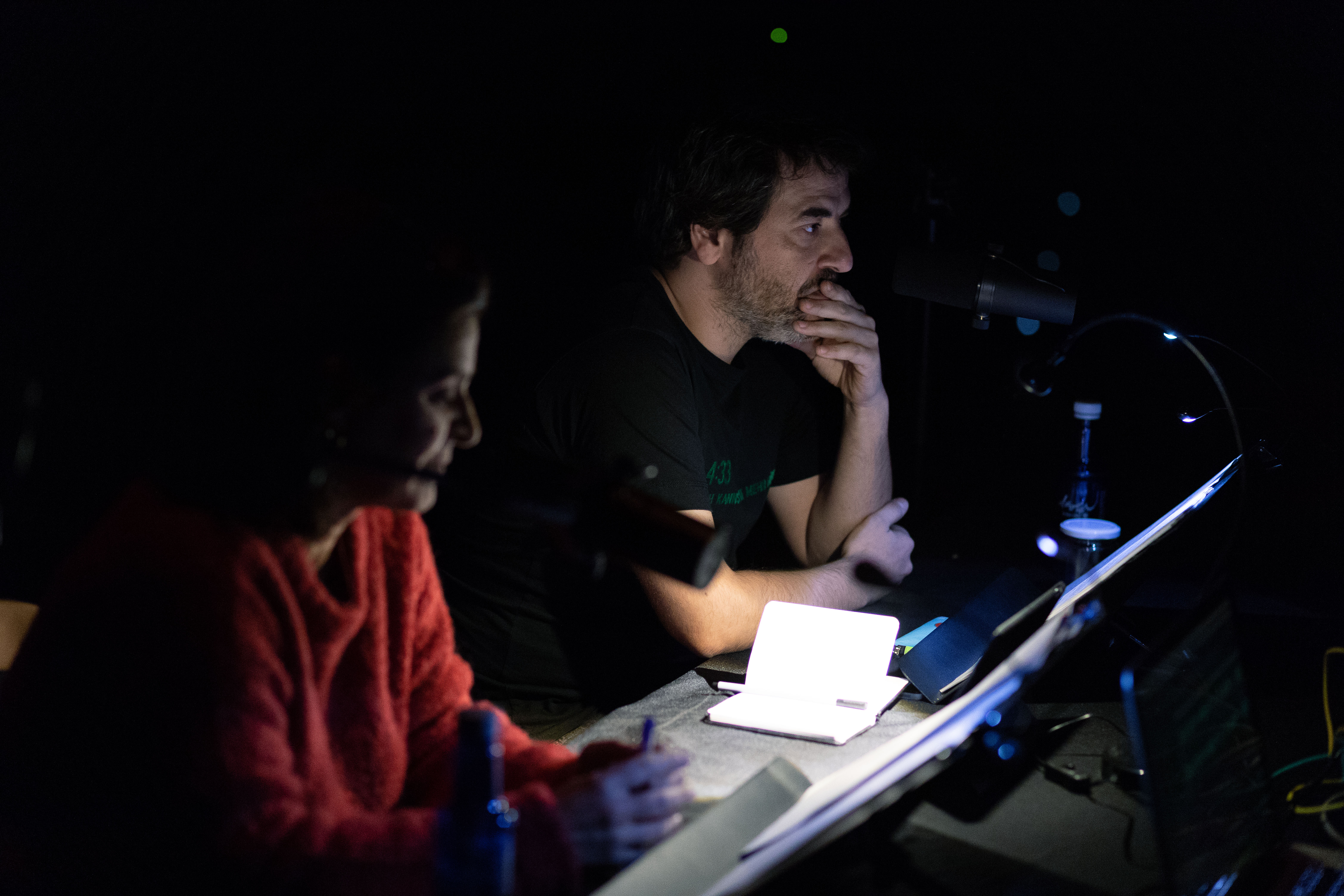 Literaktum 2018